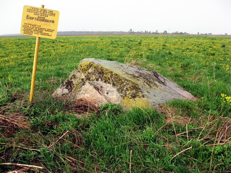 Барташы. Барташоўскі валун